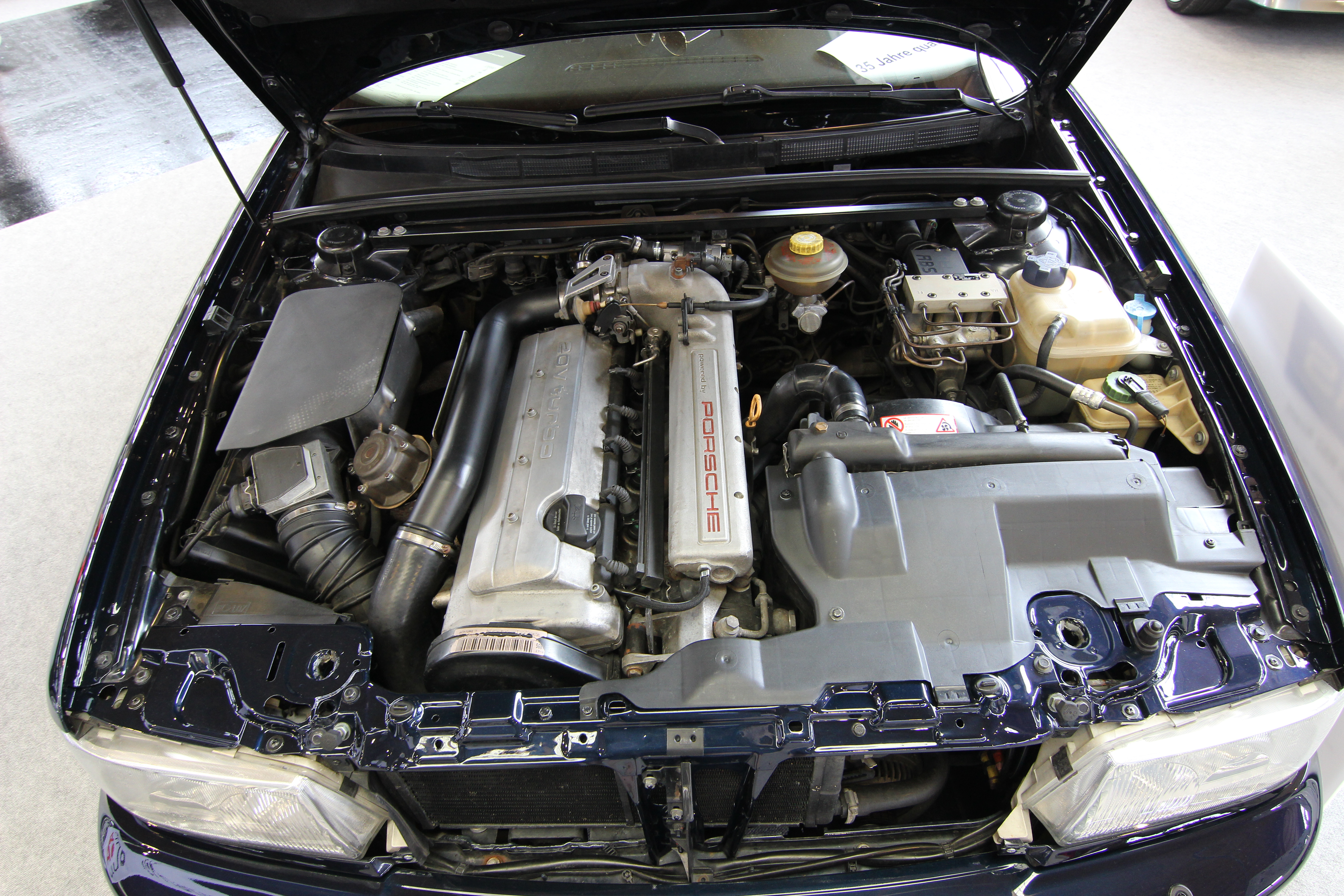 Audi RS2 Avant auf der Klassikwelt Bodensee in Friedrichshafen Porschemotor vom Audi RS2 Avant auf der Klassikwelt Bodensee in Friedrichshafen